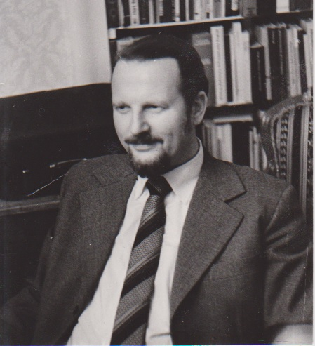 Georg Brack, Merseburg (1980)